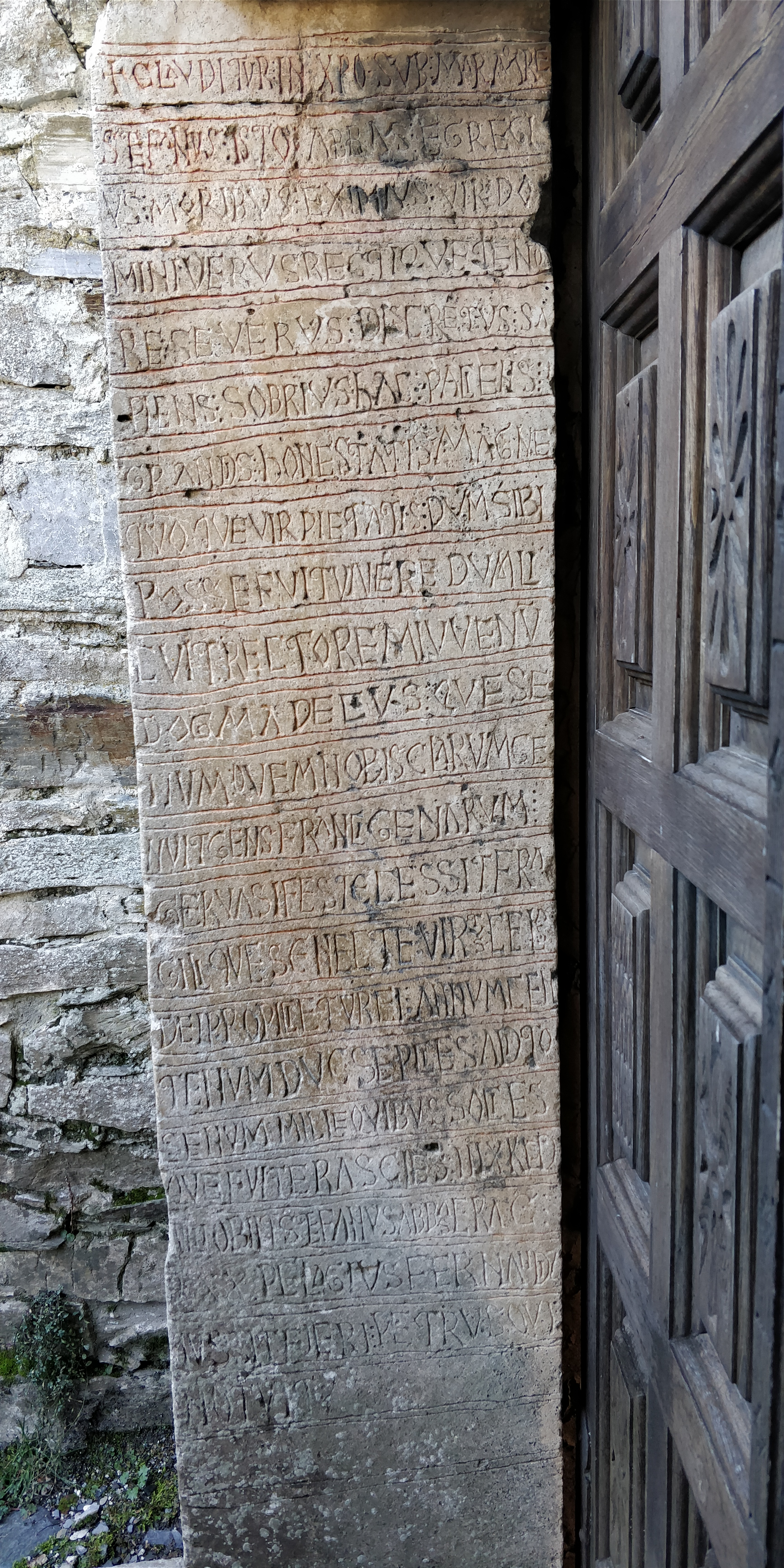 Inscripciones existentes en la jamba de la puerta norte del templo. Detalle.